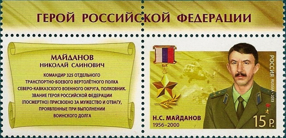 Почтовая марка России 2013 года. Герои РФ. Майданов Н.С.